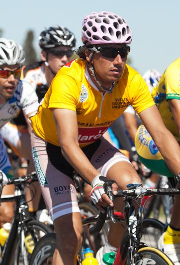 Ciclista colombiano Iván Mauricio Casas, en la Vuelta Ciclista del Uruguay 2012